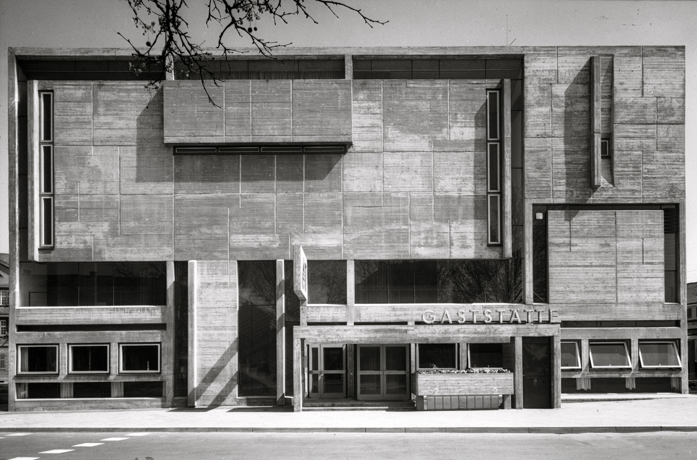 Haus Sindlingen, Westfront. Architekt: Günter Bock, Fotograf: Jupp Falke